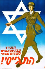 כרוז הקורא לגיוס נשות הישוב העברי לצבא הבריטי